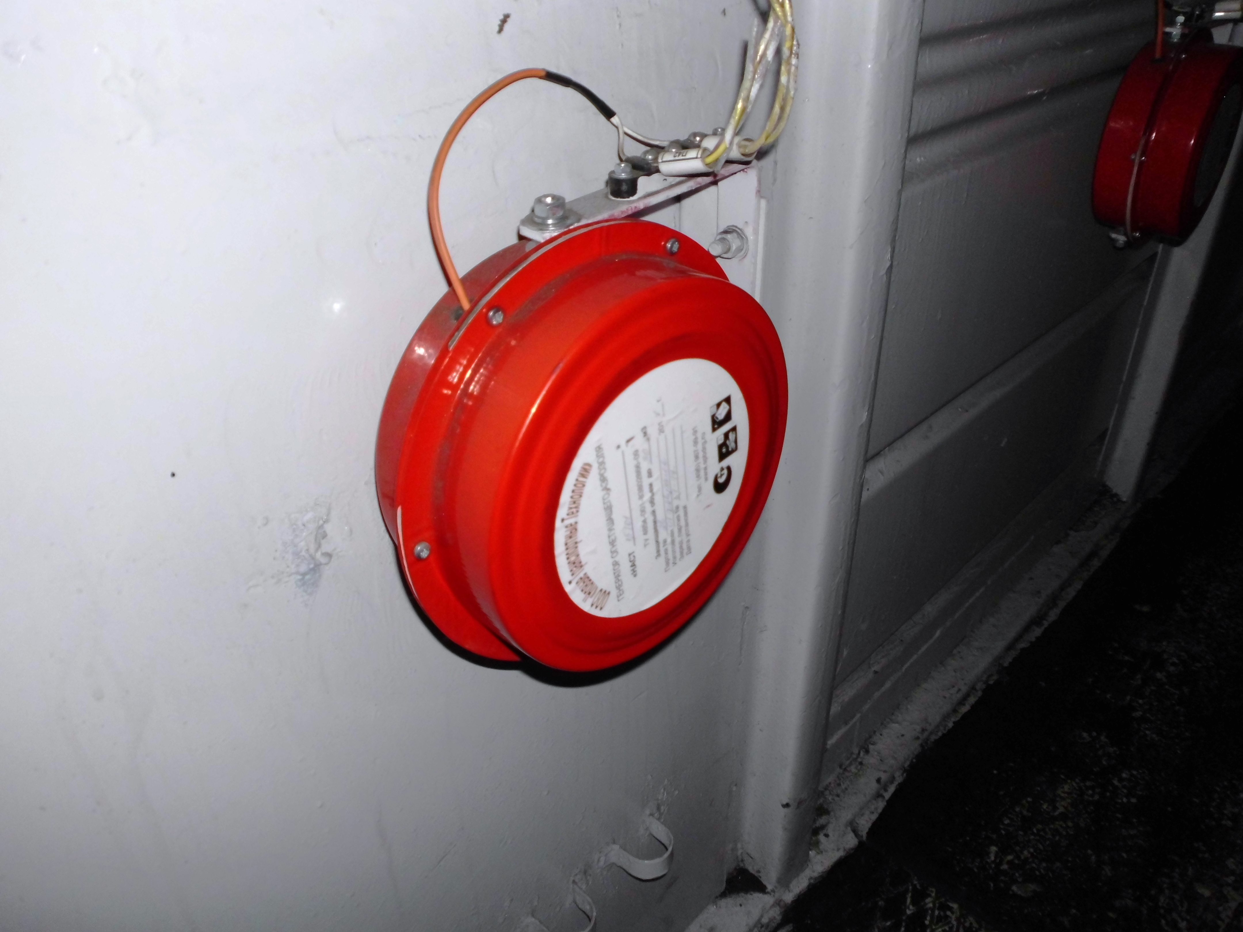 Генераторы огнетушащего аэрозоля приводимые в действие дистанционно электрическим током (автоматический или вручную) на борту электровоза ВЛ10.